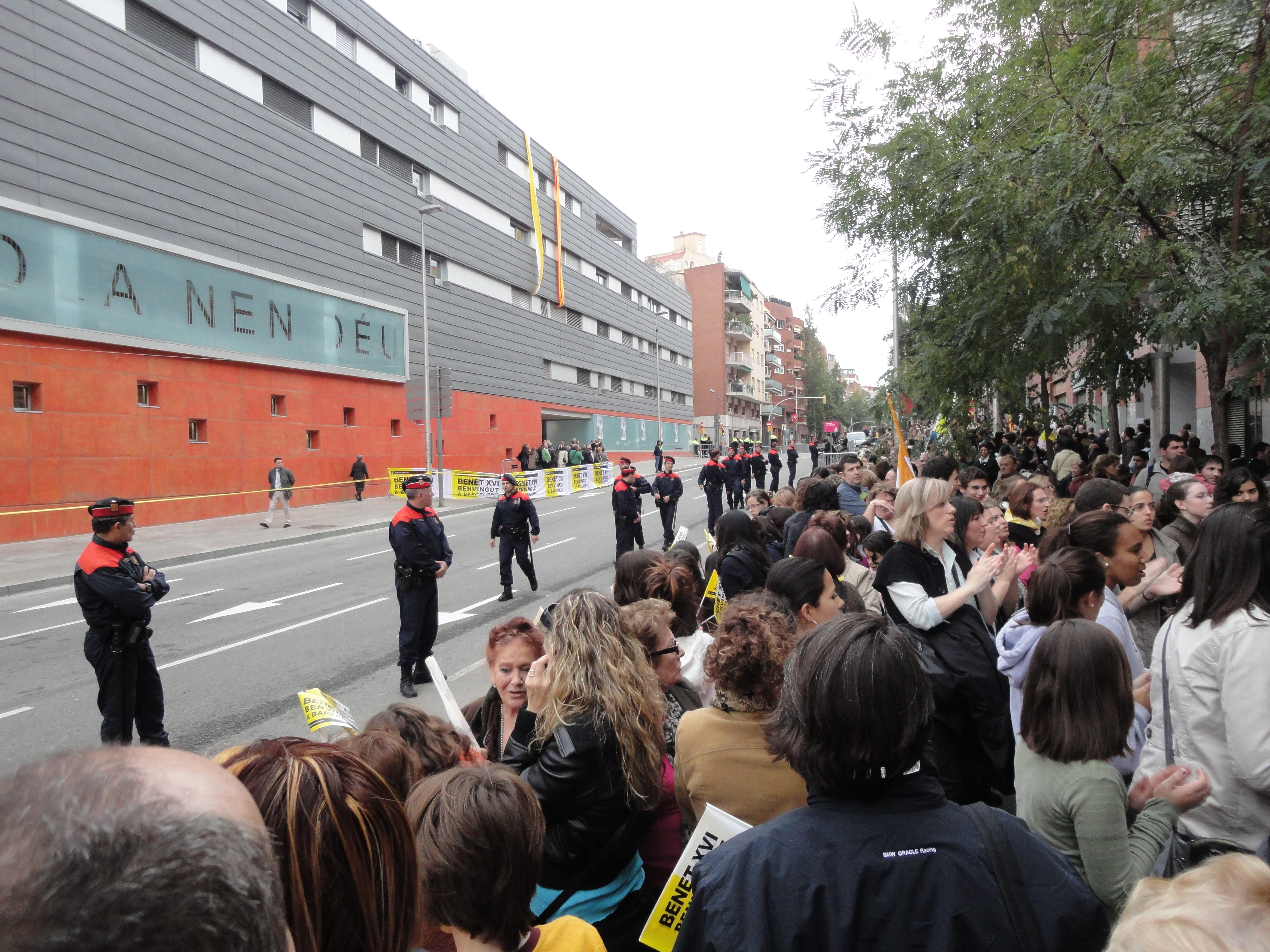 Visita Papa 2010 Barcelona